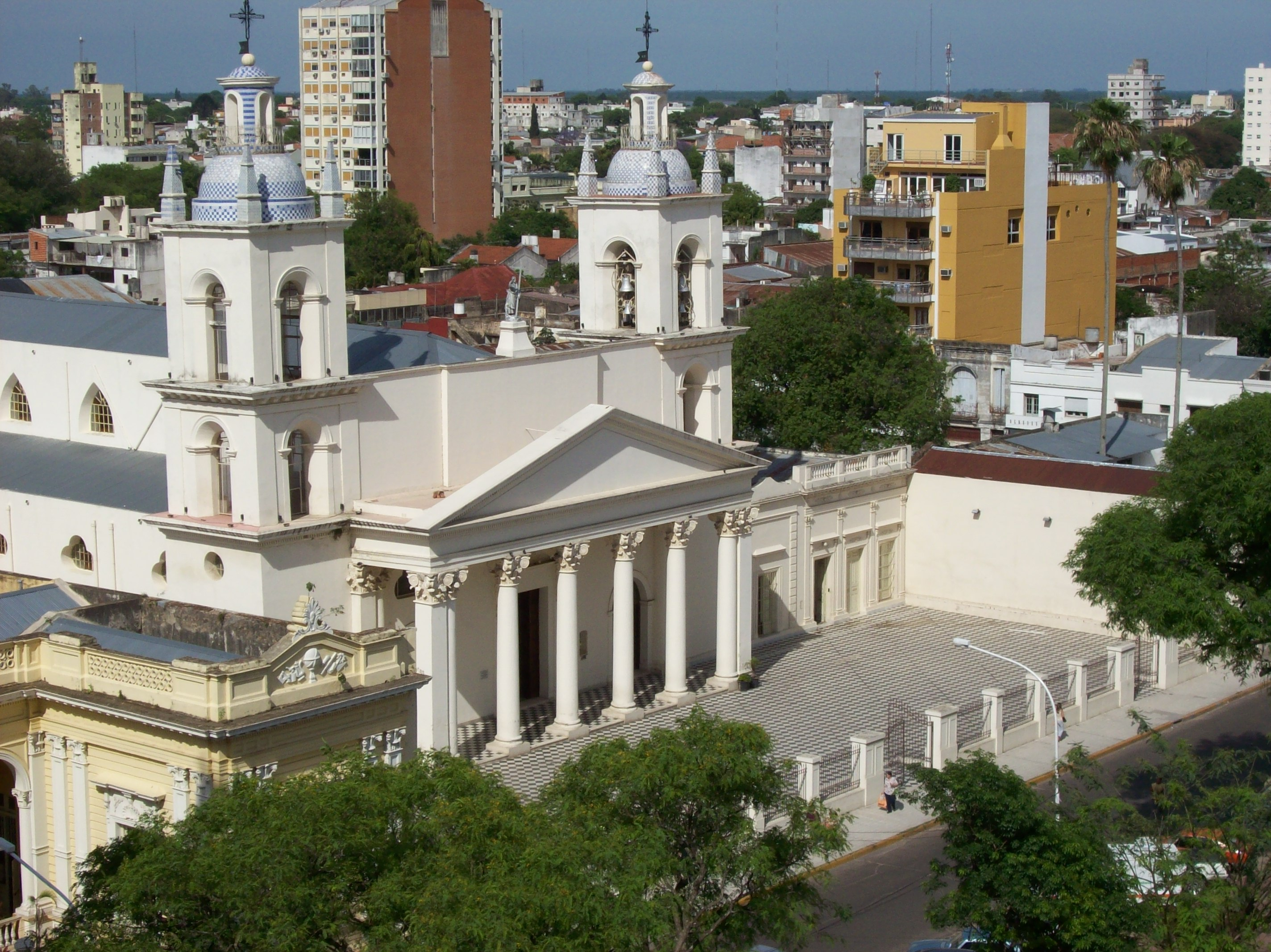 Iglesia Catedral frente a la plaza J.B.Cabral en la ciudad de Corrientes